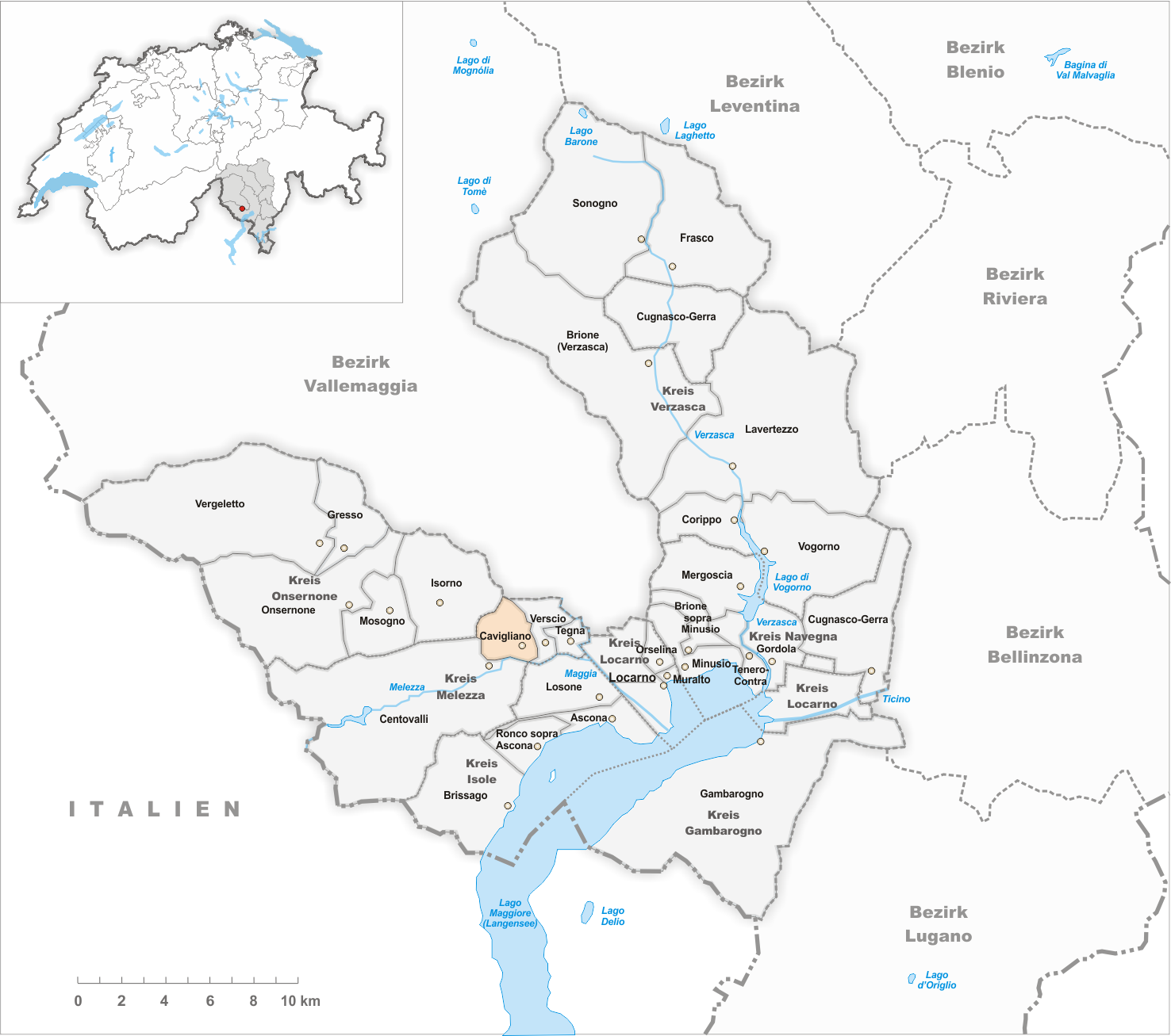 Municipality Cavigliano Artist: Tschubby